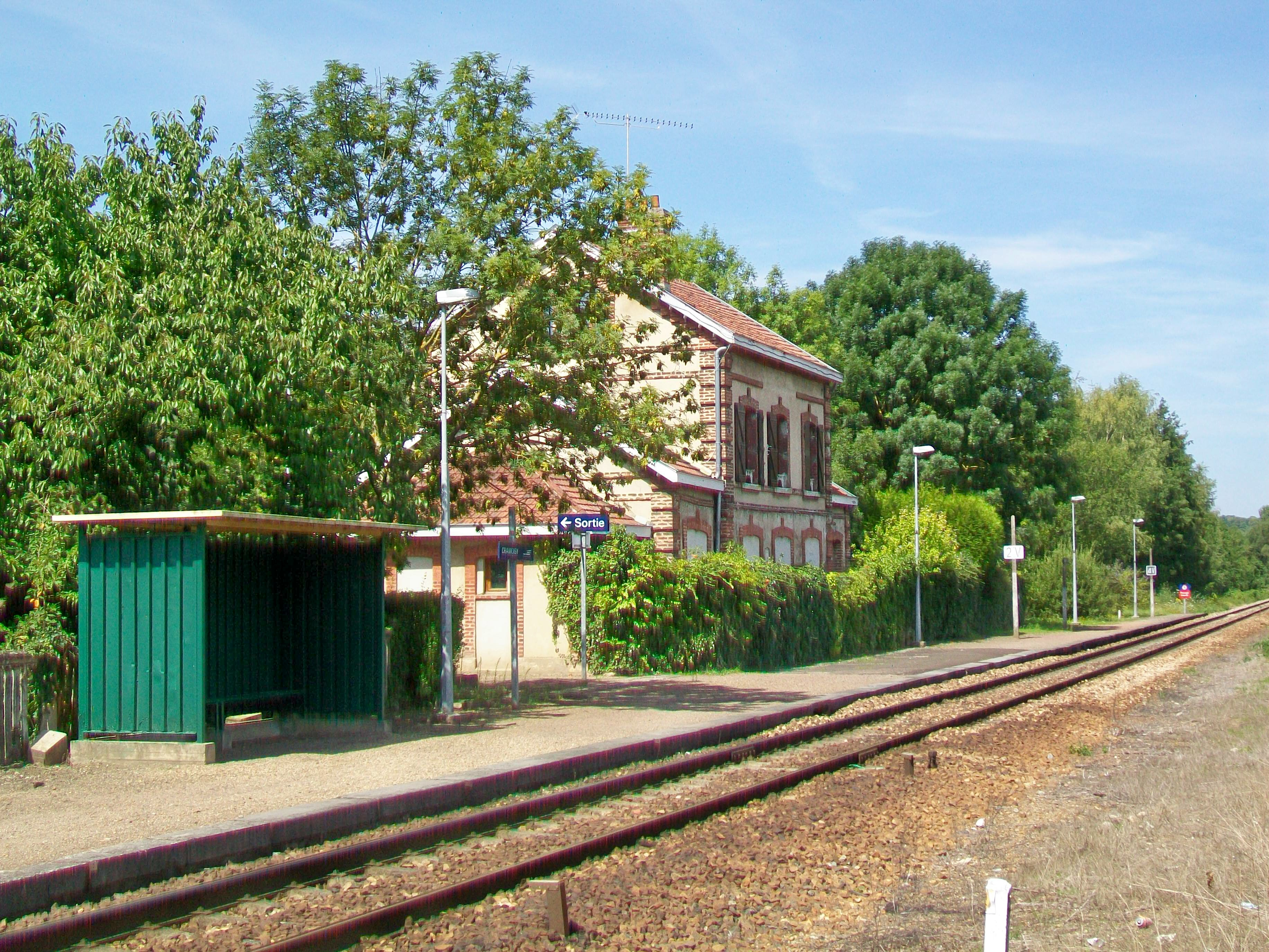 La gare côté voie.